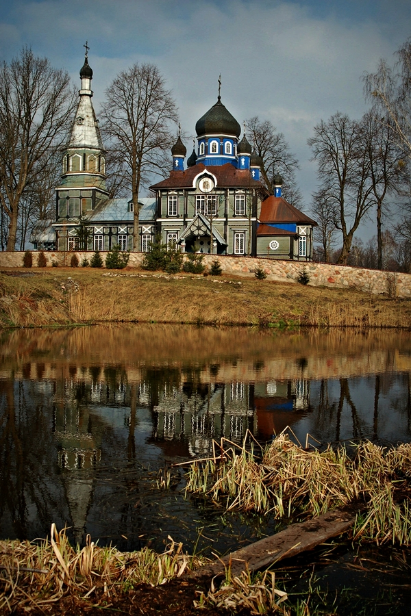 Puchły, zespół cerkwi prawosławnej par. p.w. Opieki Matki Bożej